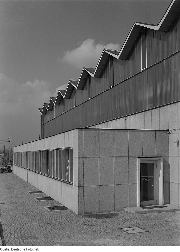 Original image description from the Deutsche Fotothek Dresden. Technische Universität, Institut für Fördertechnik und Baumschinen, EingangsseiteTU Dresden, Heidebroek-Bau, Nöthnitzer Straße 62